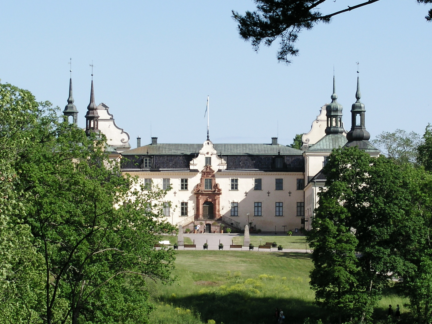 Tyresö slott, Tyresö, Sweden